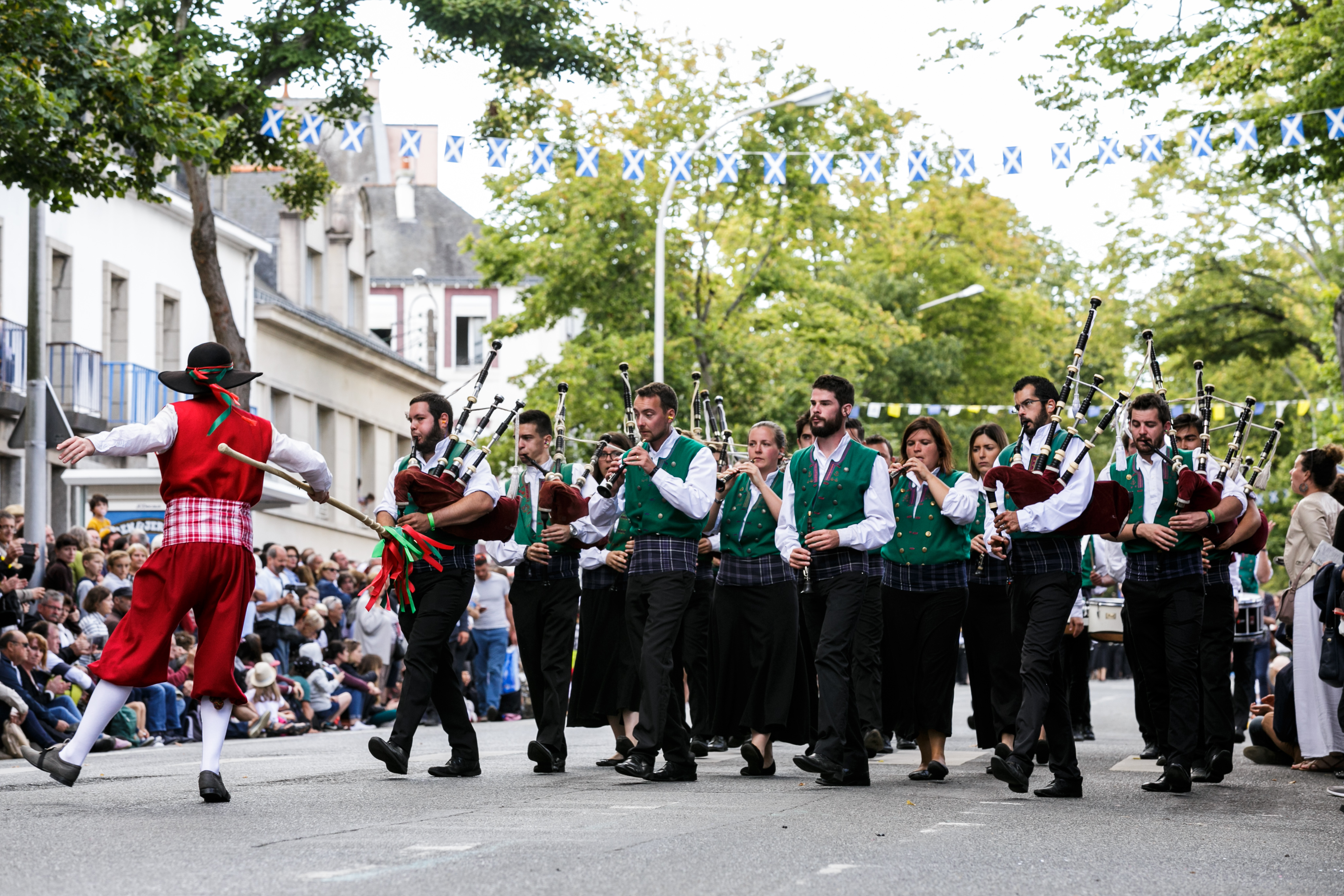 Festival Interceltique de Lorient 2017 - Grande parade des nations celtes - Bagad Plougastell